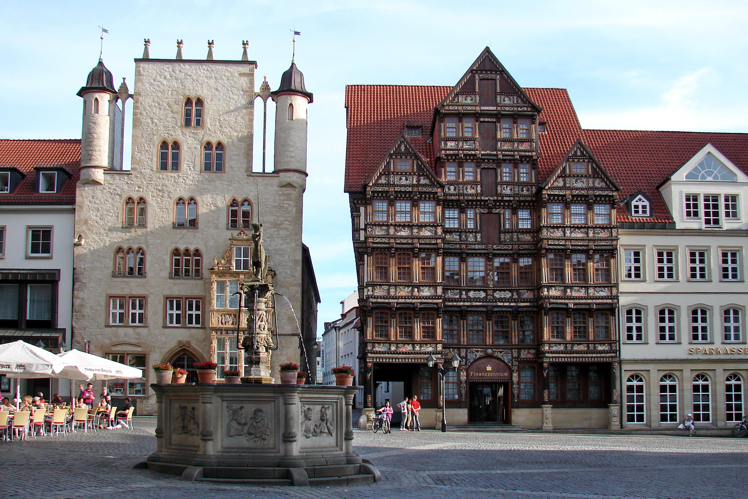 Das Tempelhaus (vor allem in älterer Literatur auch als Tempelherrenhaus bezeichnet) in Hildesheim ist ein frühgotisches Patrizierhaus an der Südseite des Historischen Marktplatzes, das um 1350 von zwei Angehörigen einer Hildesheimer Bürgermeisterfamilie, Roleff und Eggert von Harlessem, erbaut wurde.